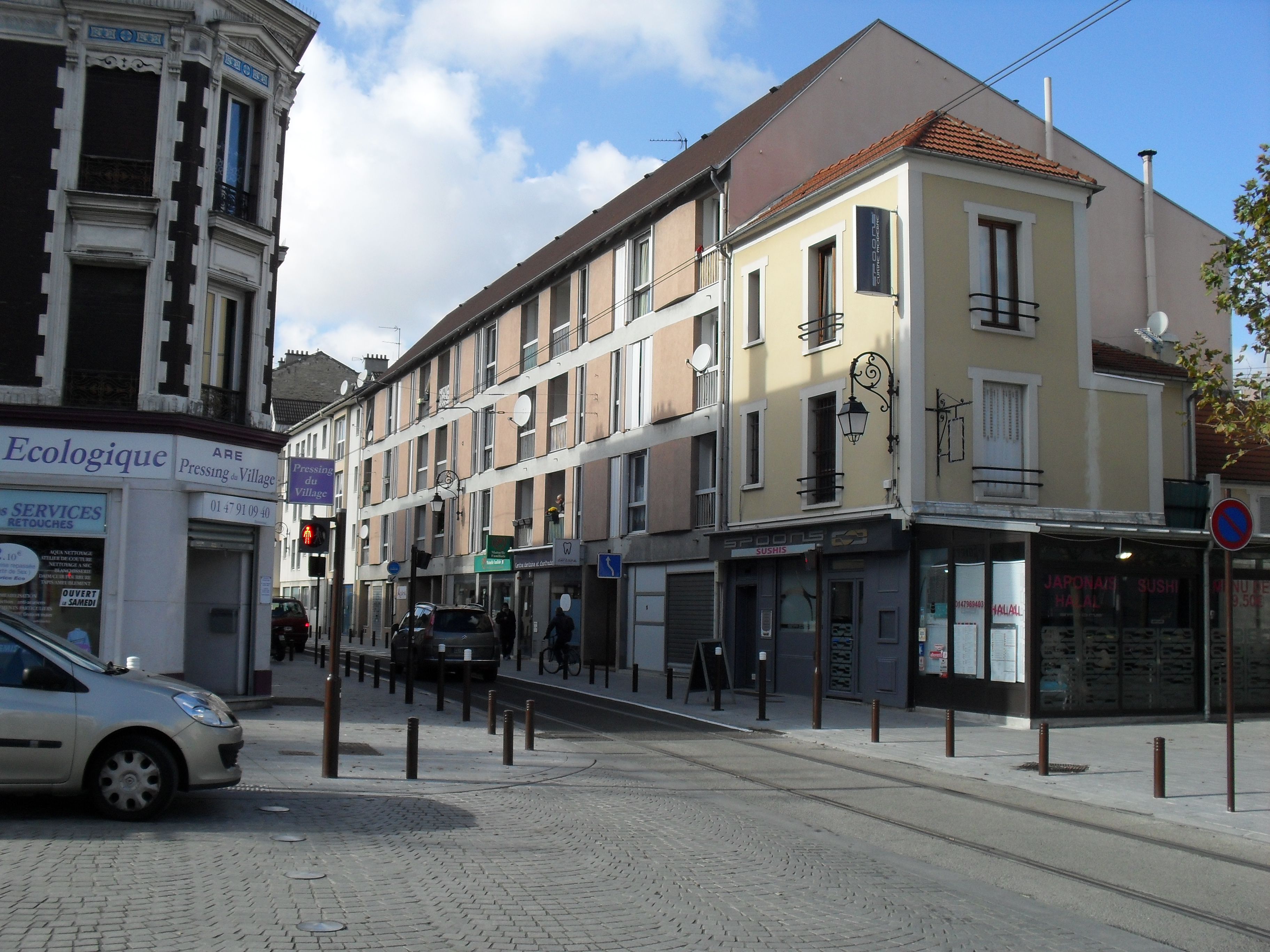 Paris Tramway ligne 1